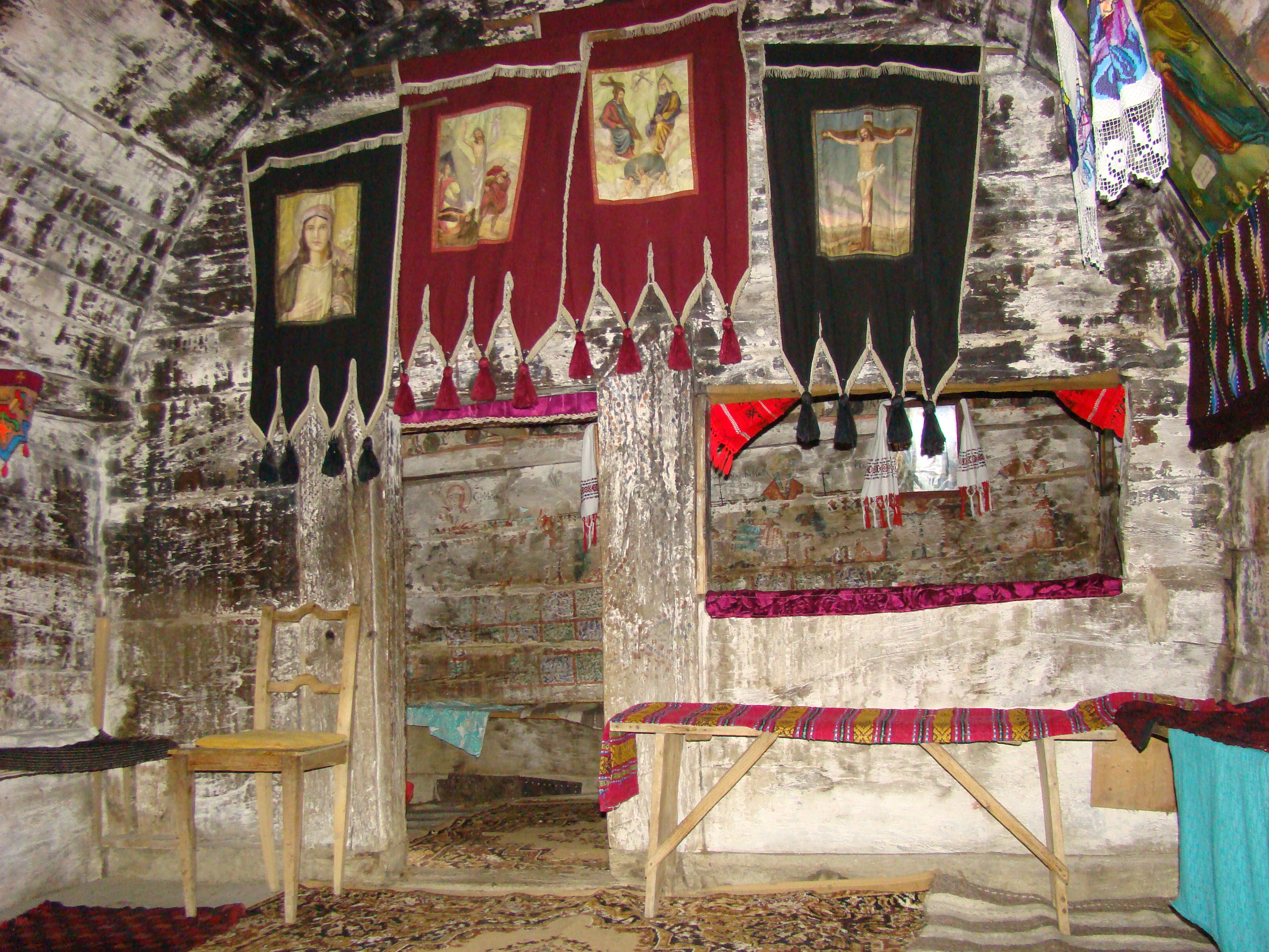 Biserica de lemn „Înălţarea Sfintei Cruci" din Pruneni